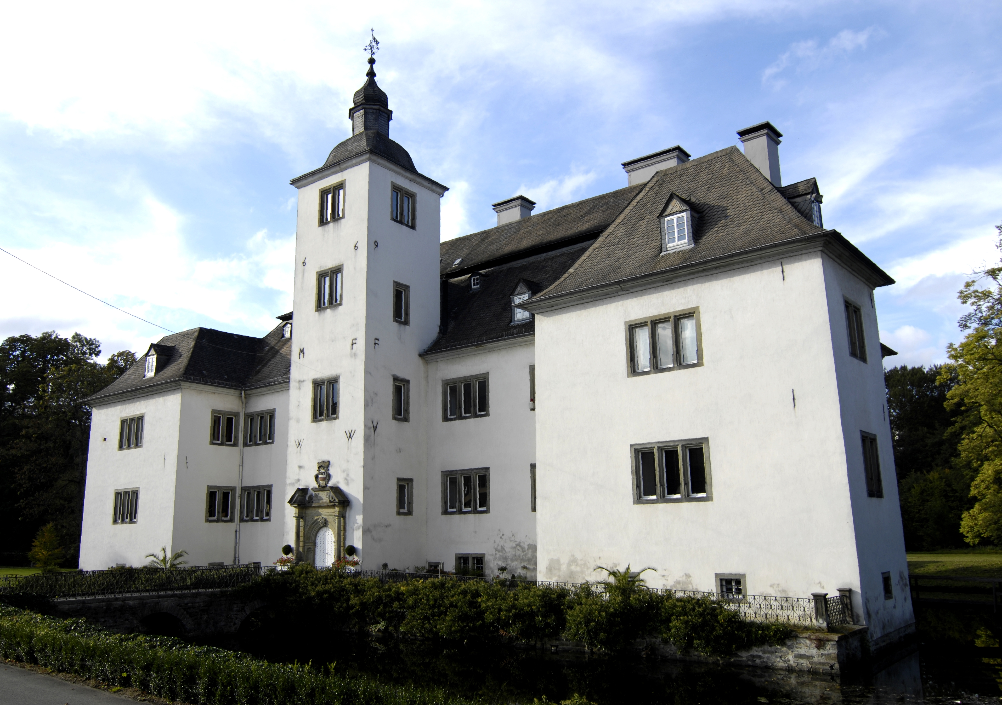 Schloss Laer bei Meschede This is a photograph of an architectural monument.